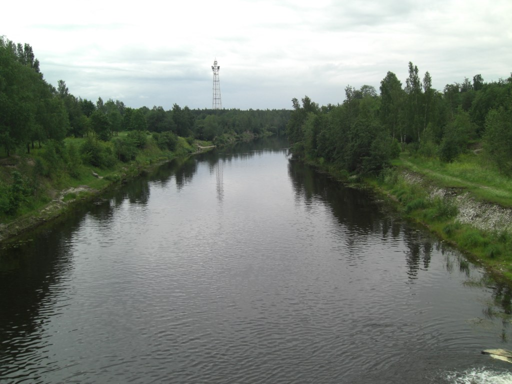 Река Плюсса в Сланцах (Ленинградская область)